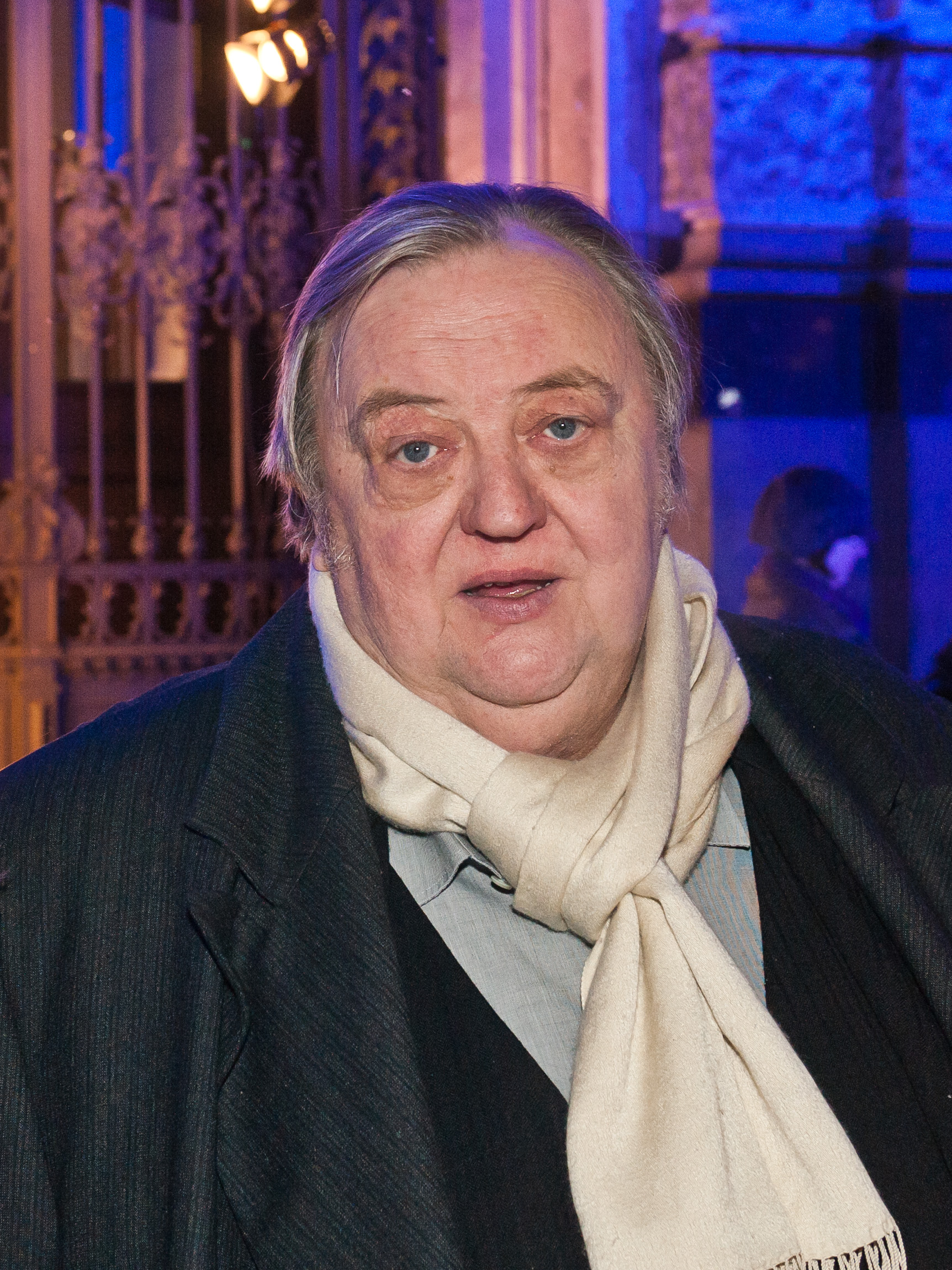 Dieter Pfaff, German actor, Berlinale 2012, ARD Degeto Blue Hour Party